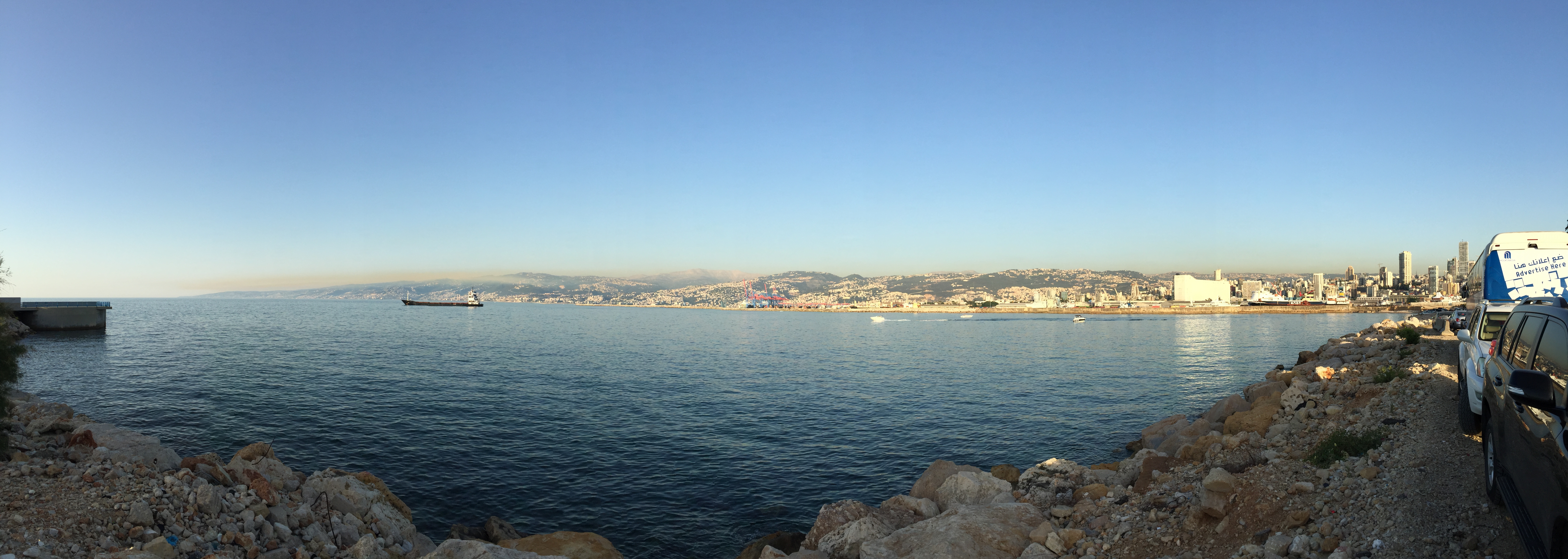 Beyrouth et Jounieh panorama